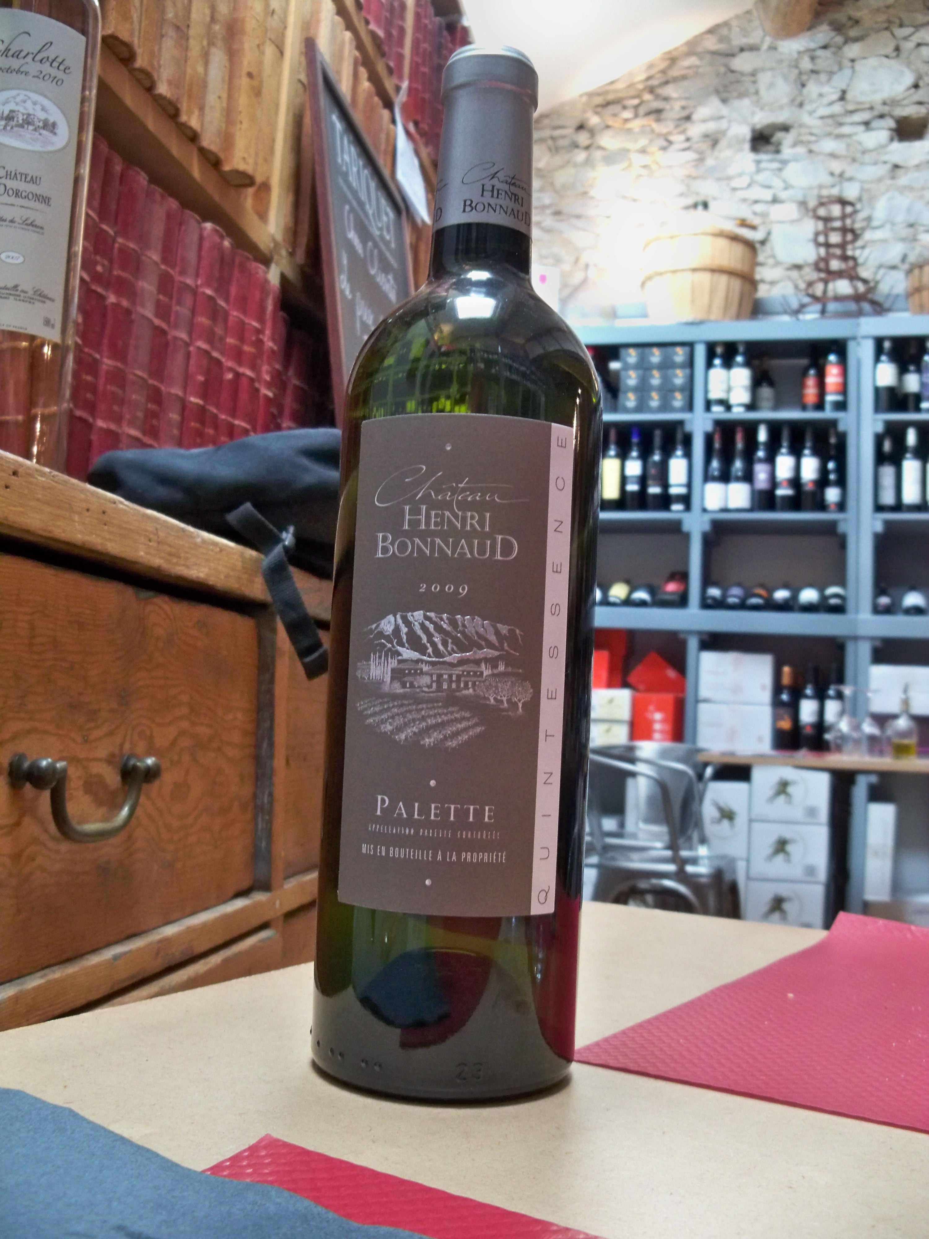 Bouteille Palette AOC